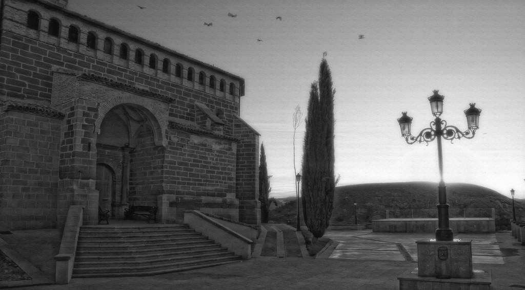 Amanecer en la iglesia de Peraltilla